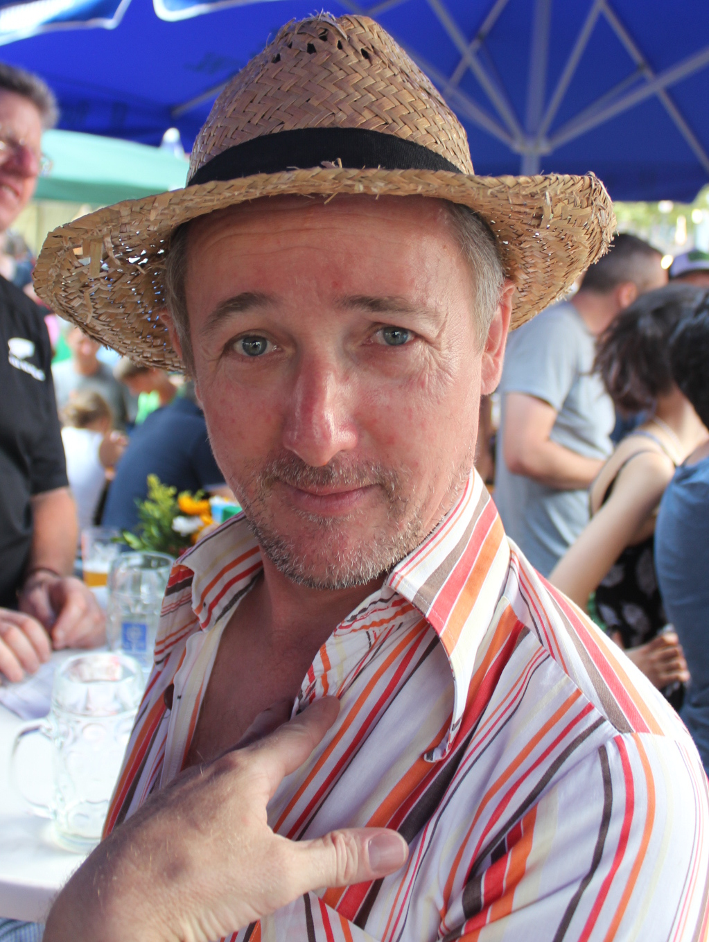 Tim J. Webb beim OzFest 2015